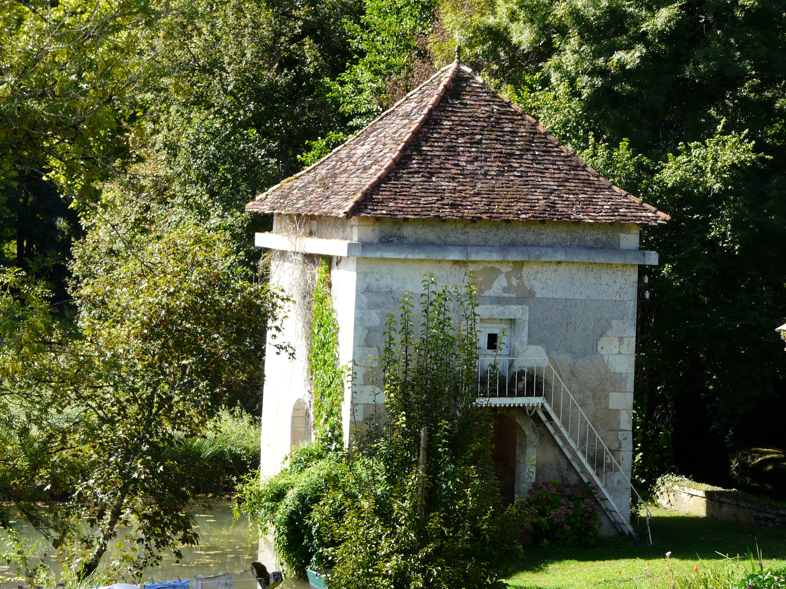 L'ancien pigeonnier de la maison Chastenet, Issac, Dordogne, France.